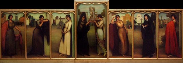 El Poema de Córdoba es un políptico del pintor cordobés Julio Romero de Torres. Está compuesto por siete paneles, y es una alegoría de la ciudad de Córdoba a través de sus personajes históricos más ilustres. Actualmente se conserva en el Museo Julio Romero de Torres. Fue expuesto en Madrid en la Exposición Nacional de Bellas Artes de 1915. Y entre el 27 de abril y el 8 de septiembre de 2013 estuvo temporalmente expuesto en el Museo Carmen Thyssen Málaga en el marco de la exposición «Julio Romero de Torres: Entre el mito y la tradición».